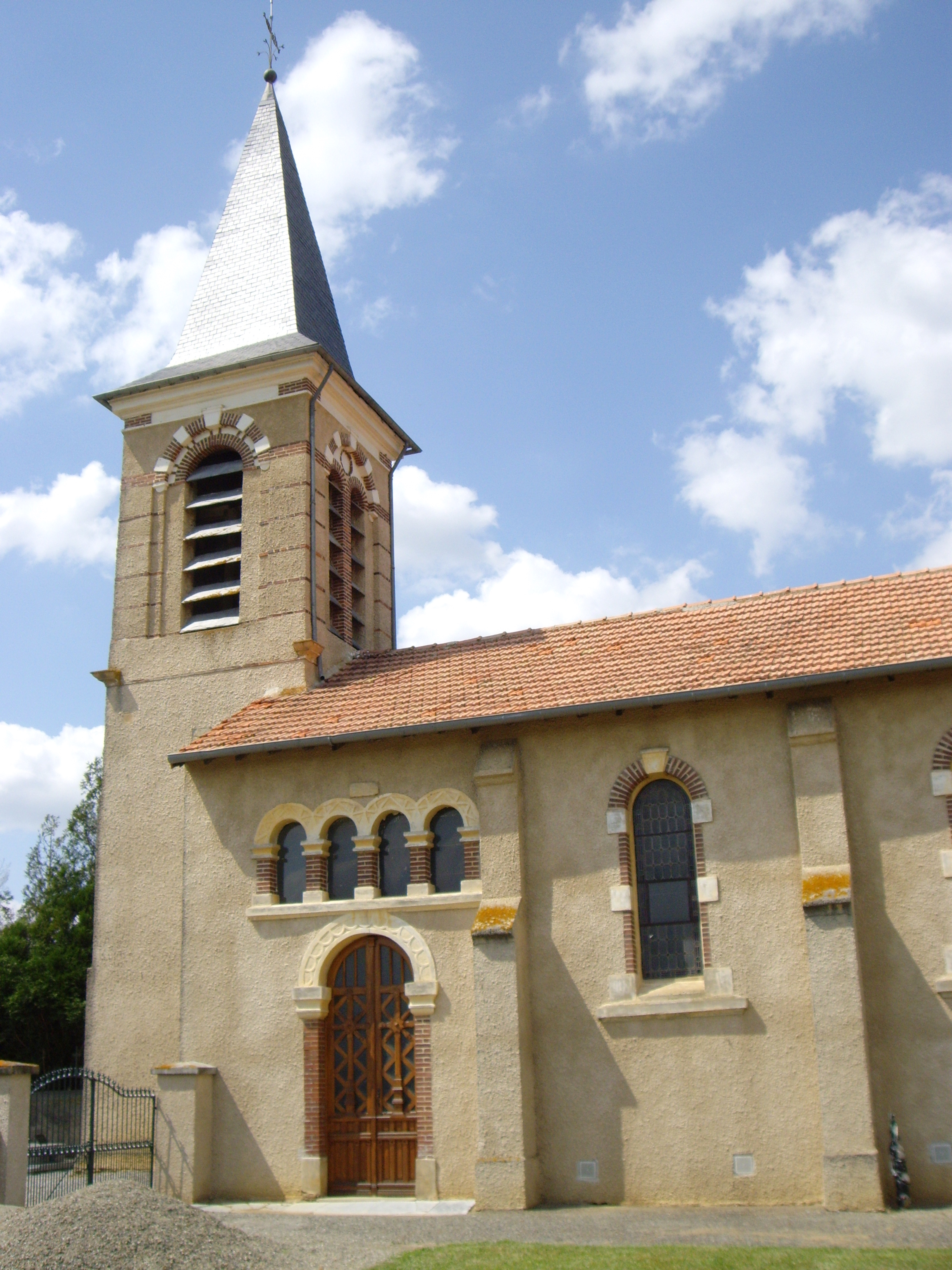 Église Saint-Martin de Peyrun (Hautes-Pyrénées, France)